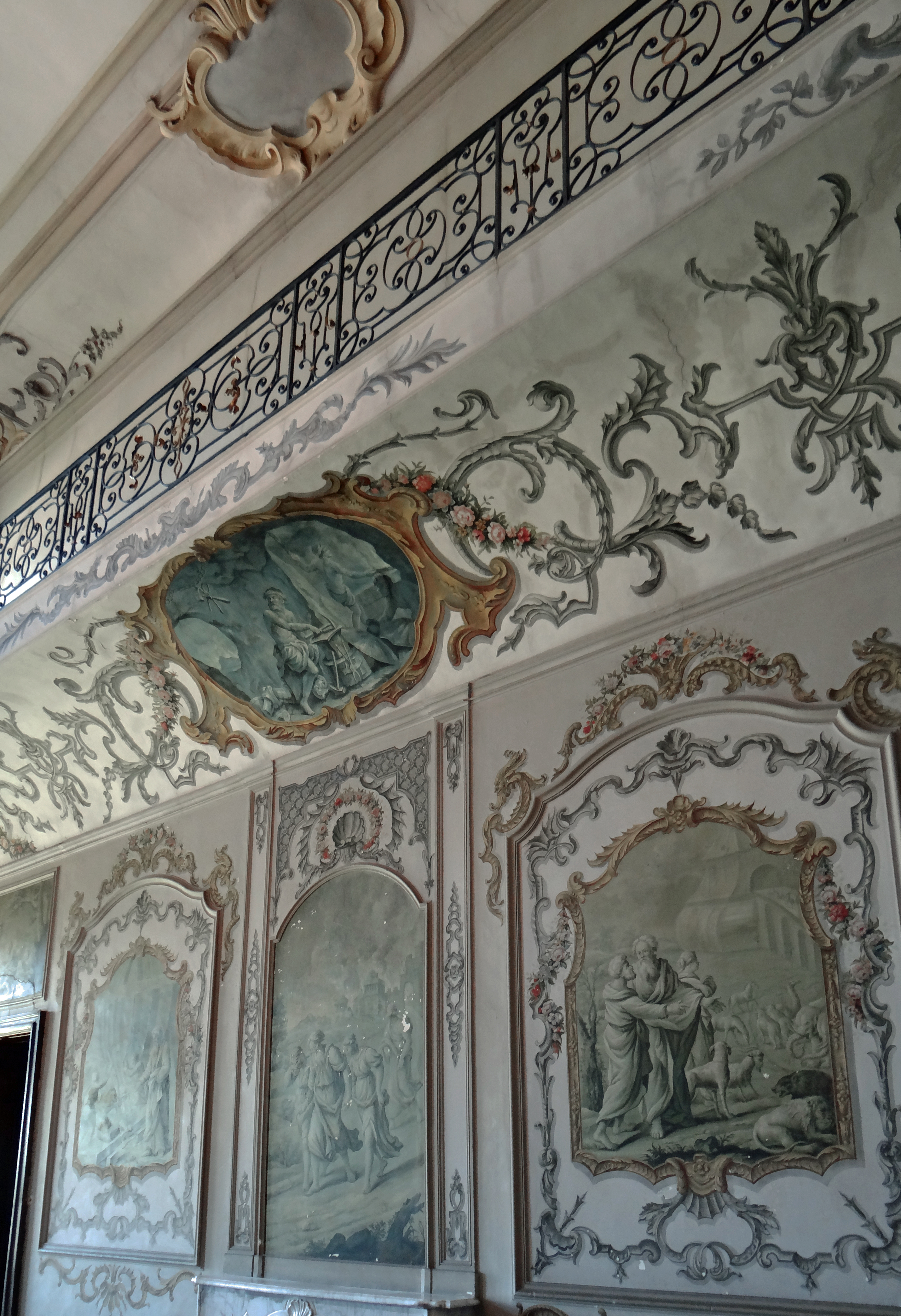 Viviers - Palais épiscopal, actuelle mairie - Salle dite à l'italienne